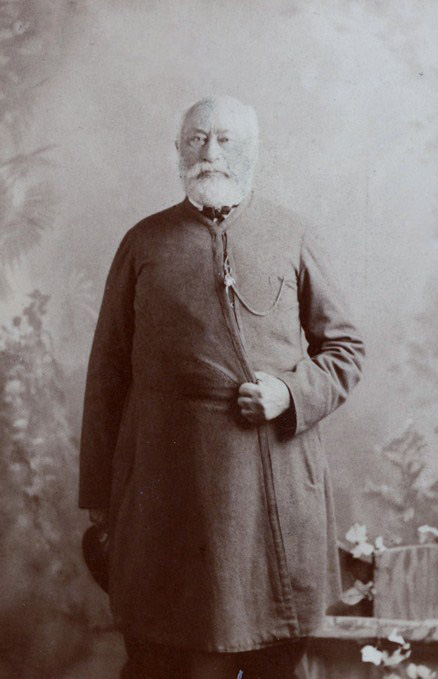 Сергей Иванович Мальцов (1810-1893)